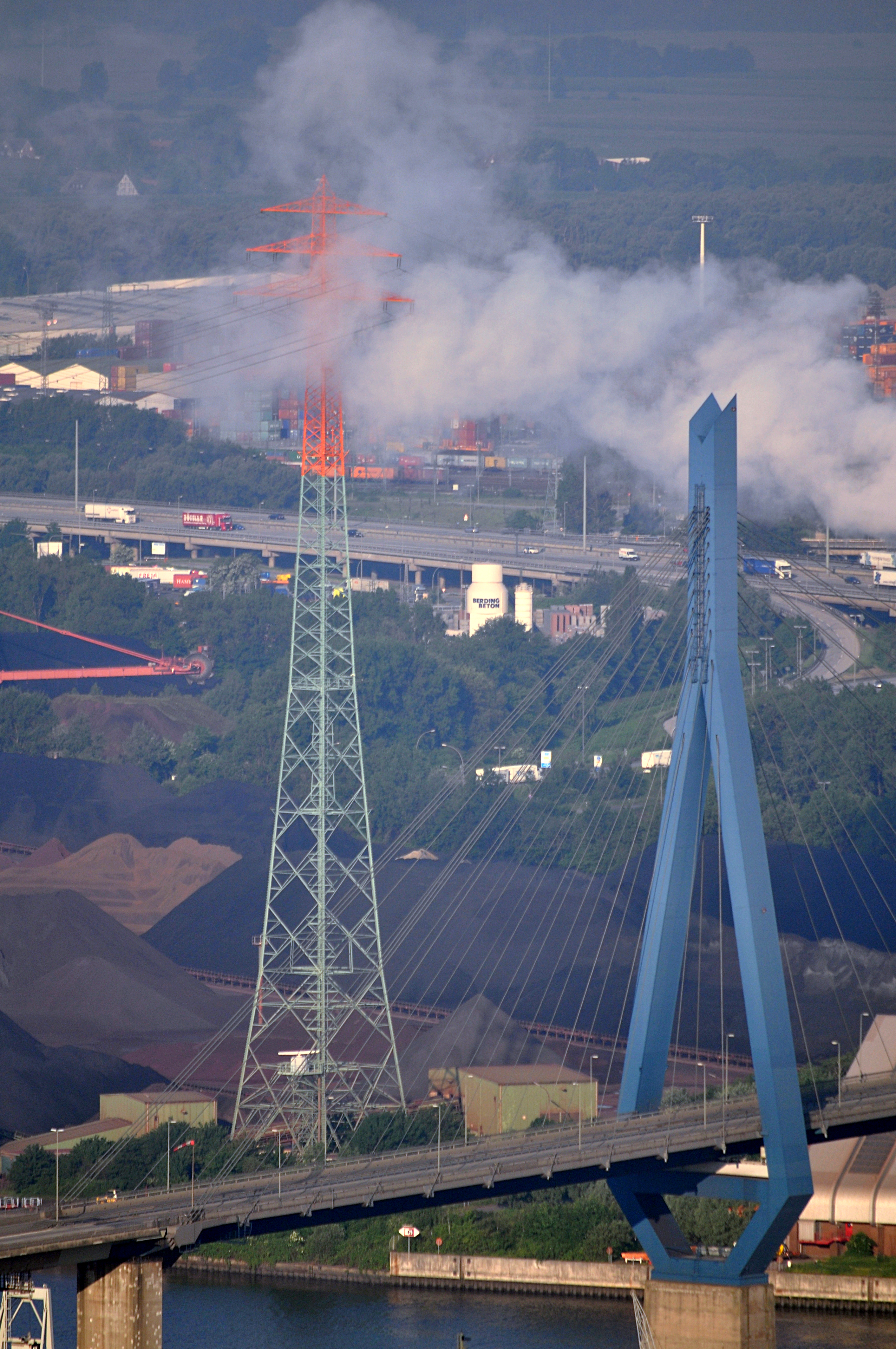 Pylon der Köhlbrandbrücke über den Köhlbrand in Hamburg.